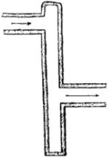 Puits et regards servant à briser la pente sur les aqueducs (notamment romains) pour empêcher l'eau de prendre une trop grande vitesse qui endommagerait les conduits.